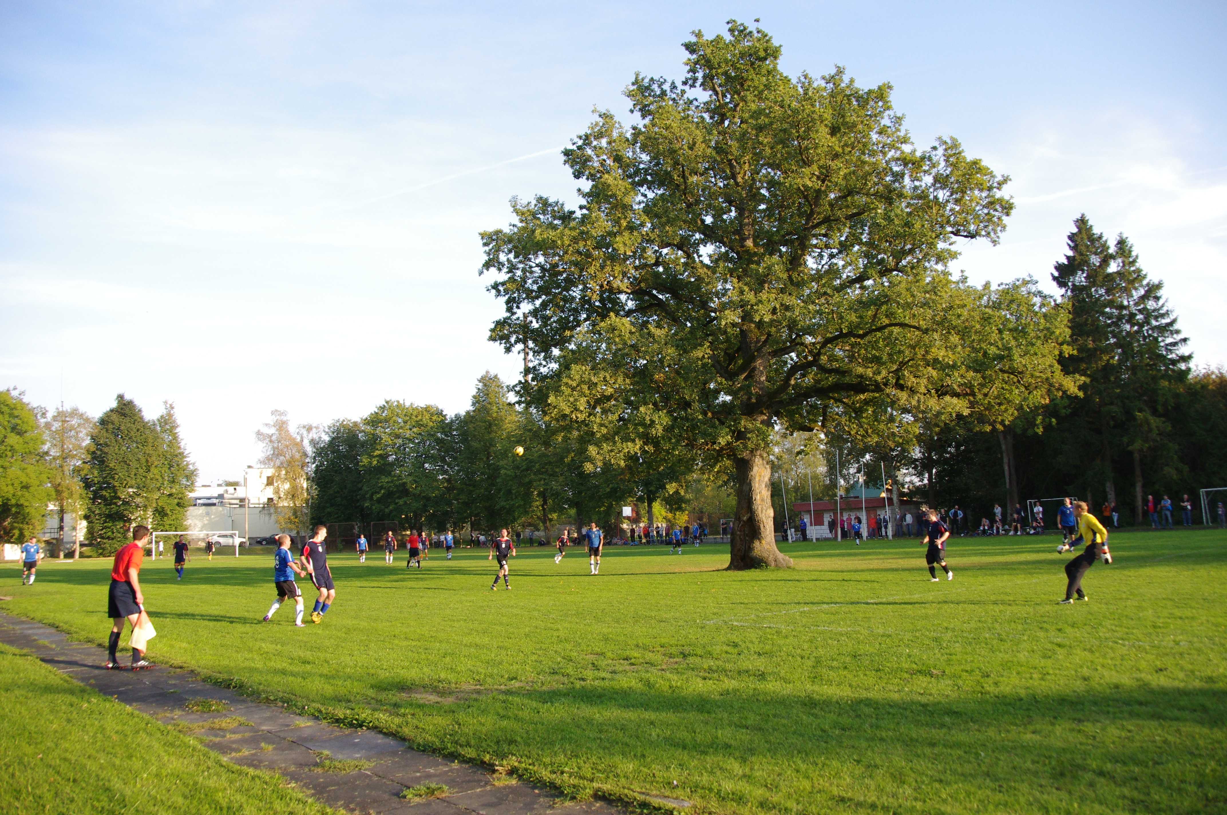 Tammepuu Orissaare jalgpallistaadionil